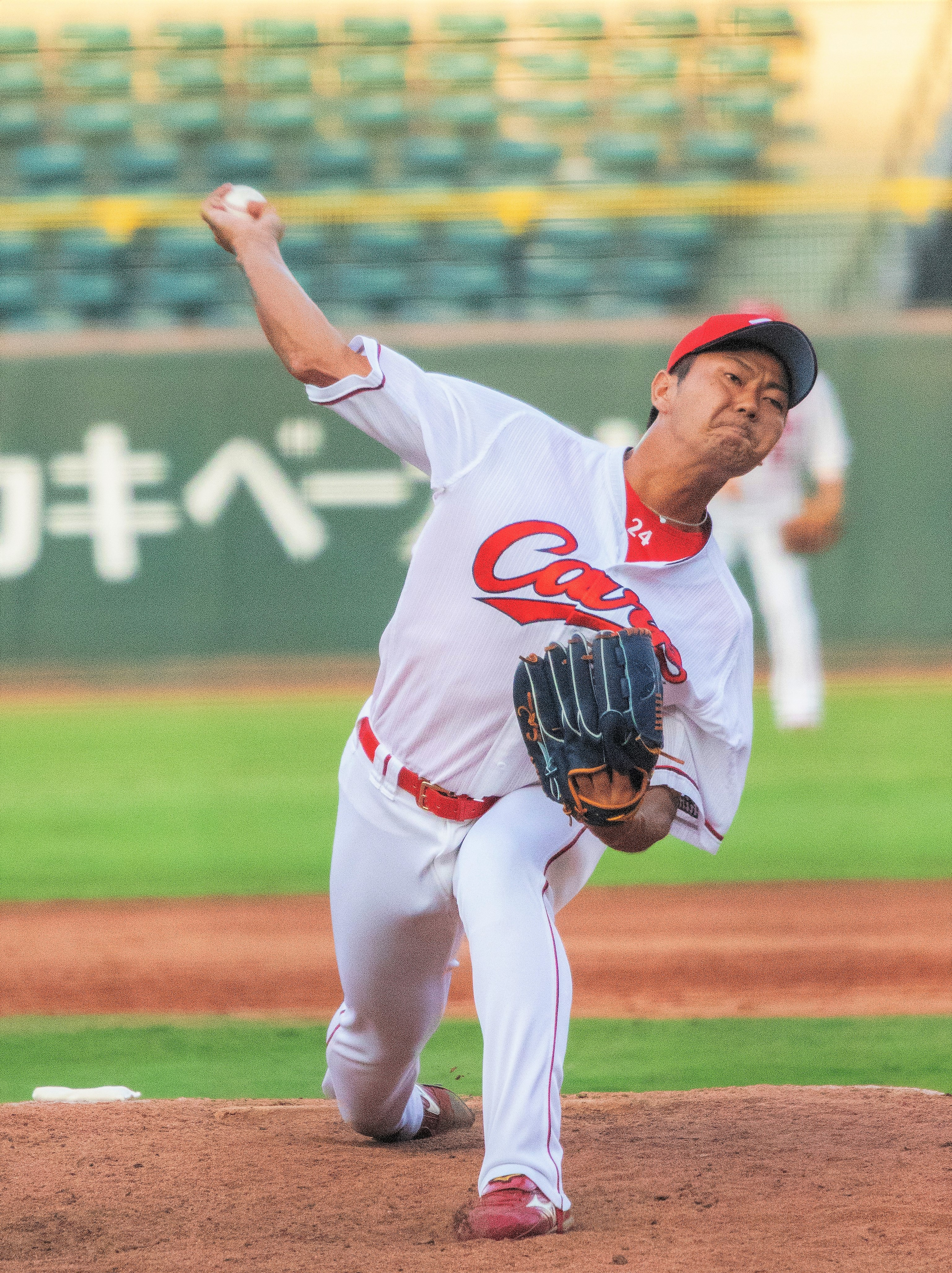 2018/8/28 マツダスタジアム